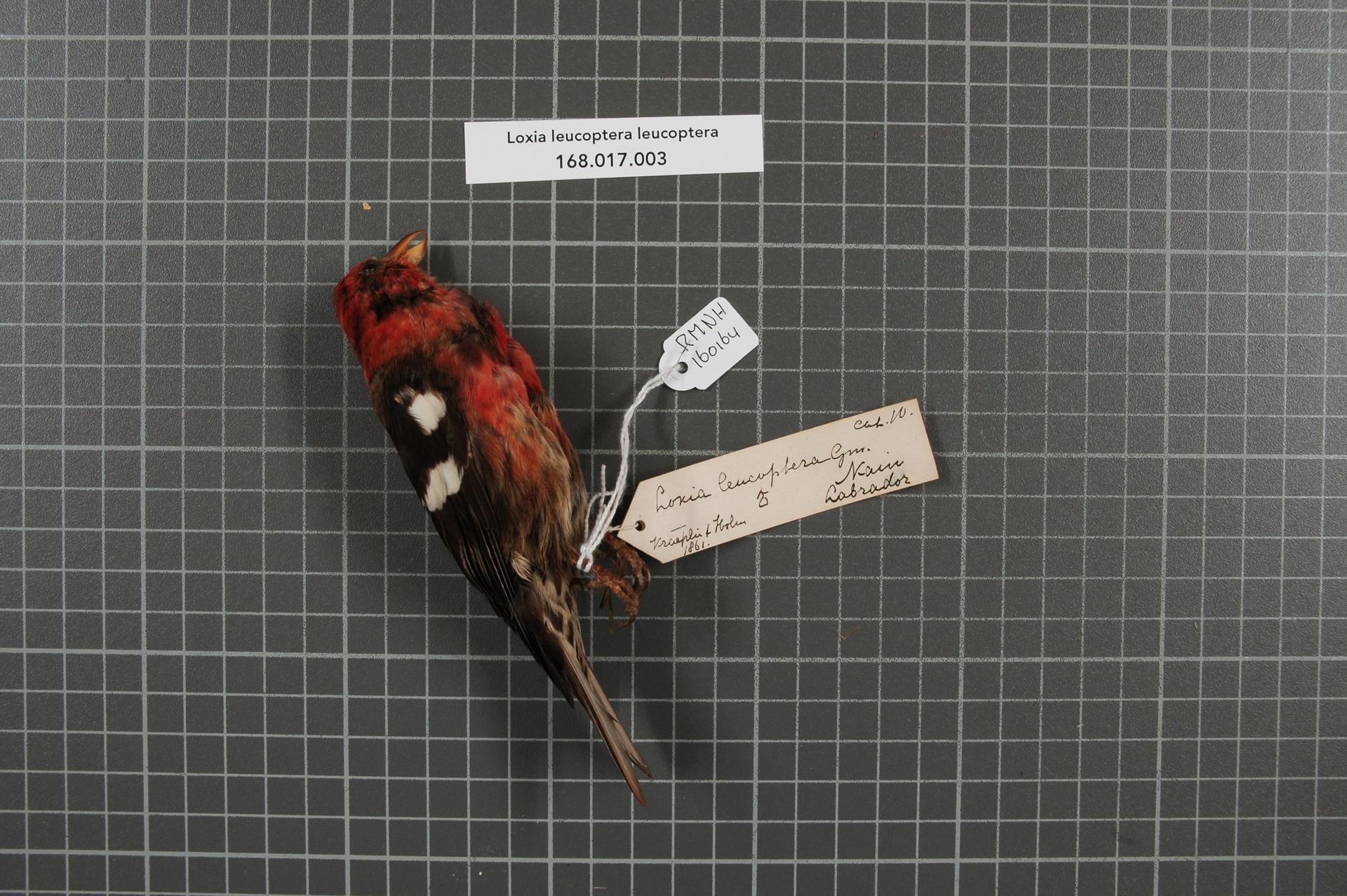 Loxia leucoptera leucoptera Gmelin, 1789